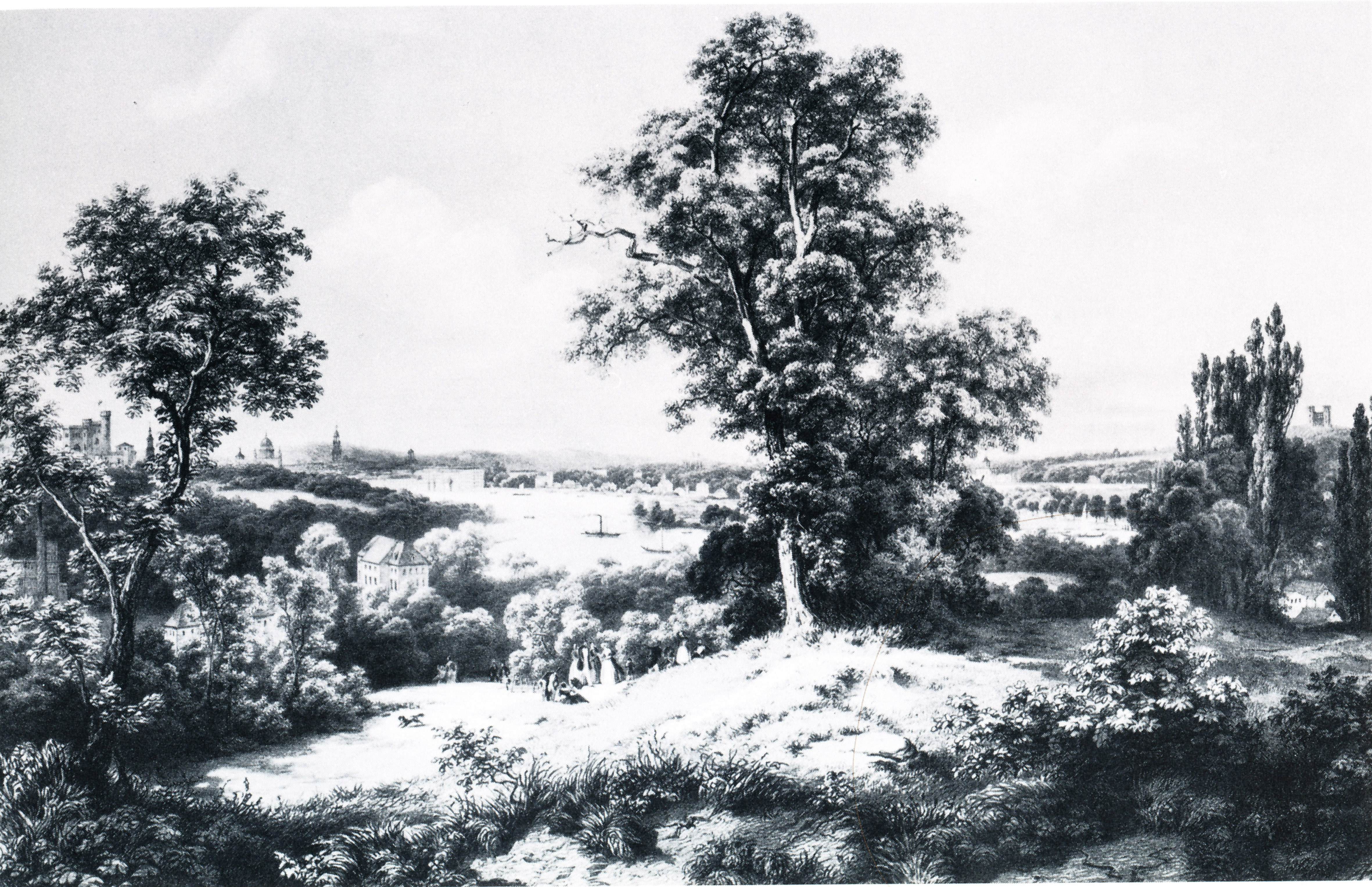 Blick vom Böttcherberg nach Potsdam, um 1850